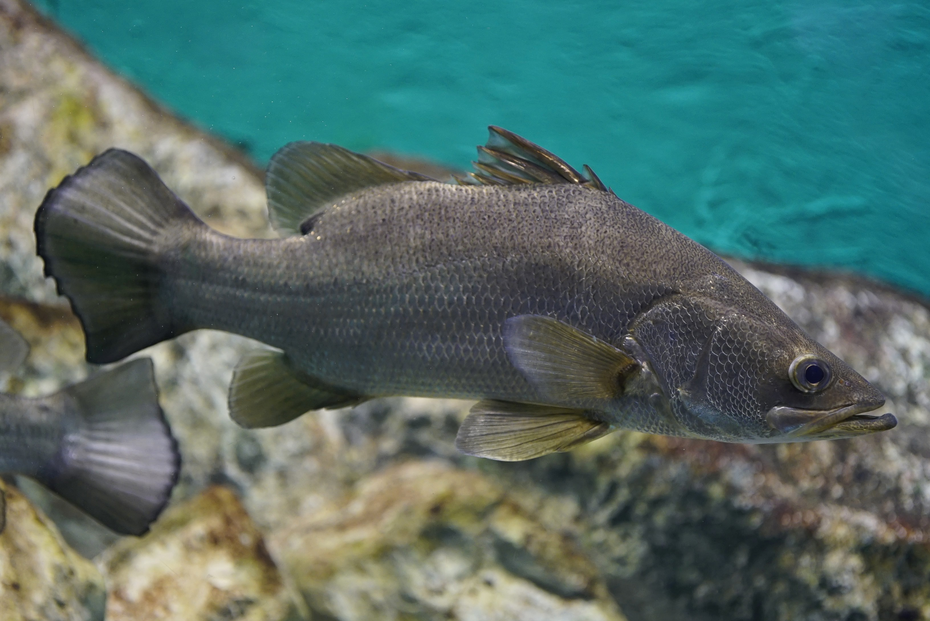 ナイルパーチ Nile perch Domain: Eukaryota • Regnum: Animalia • Phylum: Chordata • Subphylum: Vertebrata • Infraphylum: Gnathostomata • Superclassis: Osteichthyes • Classis: Actinopterygii • Ordo: Perciformes • Familia: Centropomidae • Genus: Lates Wikispecies has an entry on: Lates niloticus. Species Lates niloticus (Linnaeus, 1758) 動物界 脊索動物門 条鰭綱 スズキ目 アカメ科 アカメ属 Location: 滋賀県立琵琶湖博物館 / Lake Biwa Museum Other photos: NCBI Taxonomy ID:29147 ITIS link: Lates niloticus (Linnaeus, 1758) (mirror) EOL link: Lates niloticus uBio search link: Lates niloticus